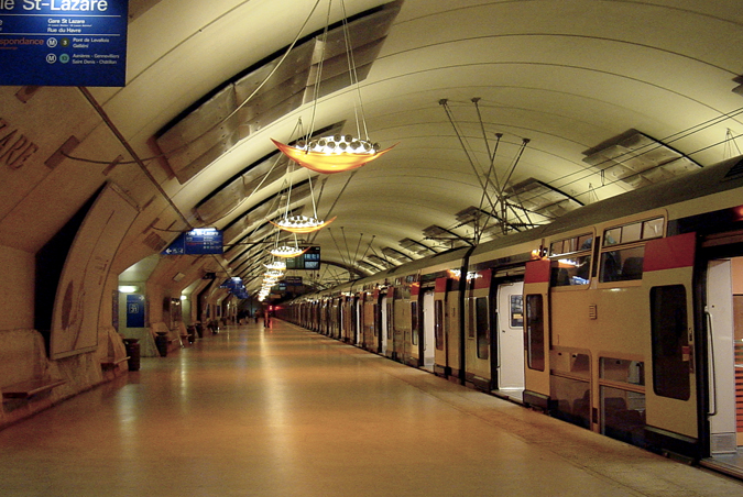 Paris RER ligne E station Saint-Lazare